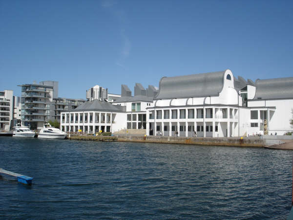 Henry Dunker Culture Centre, Helsingborg